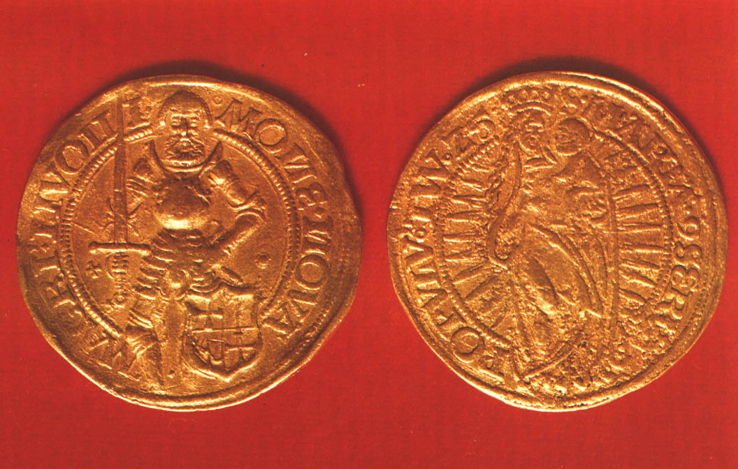 Goldtaler des Landmeisters Wolter von Plettenberg